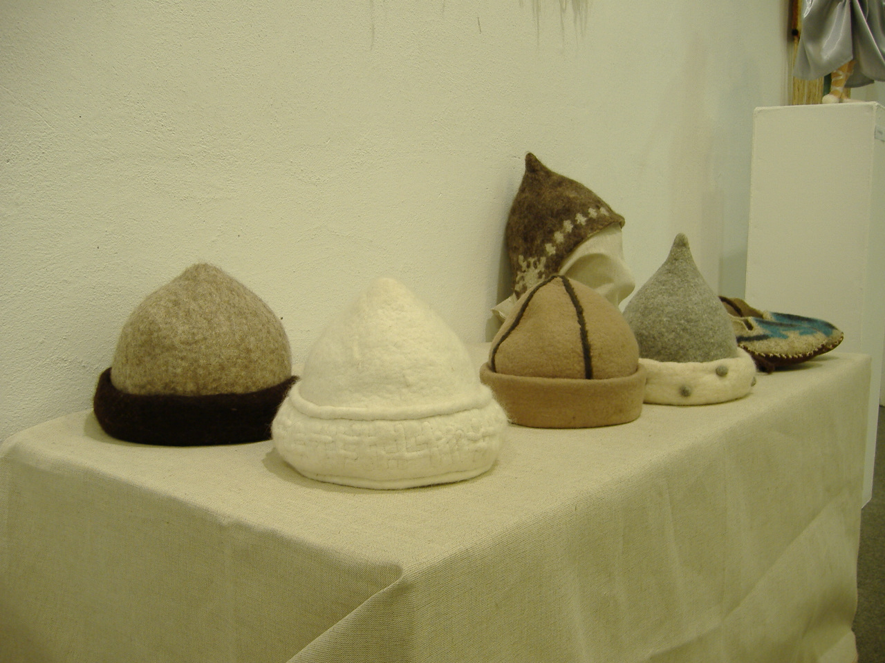 Nemezsüvegek. Készítette Tótáné Pethő Rózsa iparművész. A kép a szolnoki kiállításán készült.